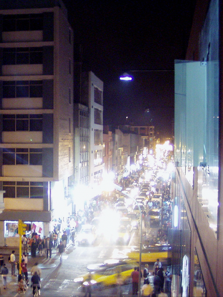 Toma nocturna del jirón "Gamarra" en el corazón comercial de la ciudad de Trujillo (Perú).